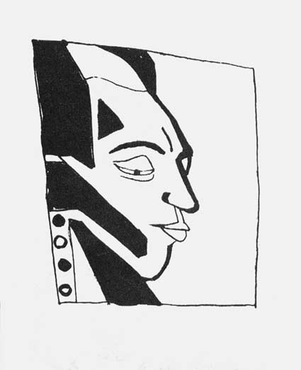 Wladimir Burliuk Portrait of Velimir Khlebnikov, 1913